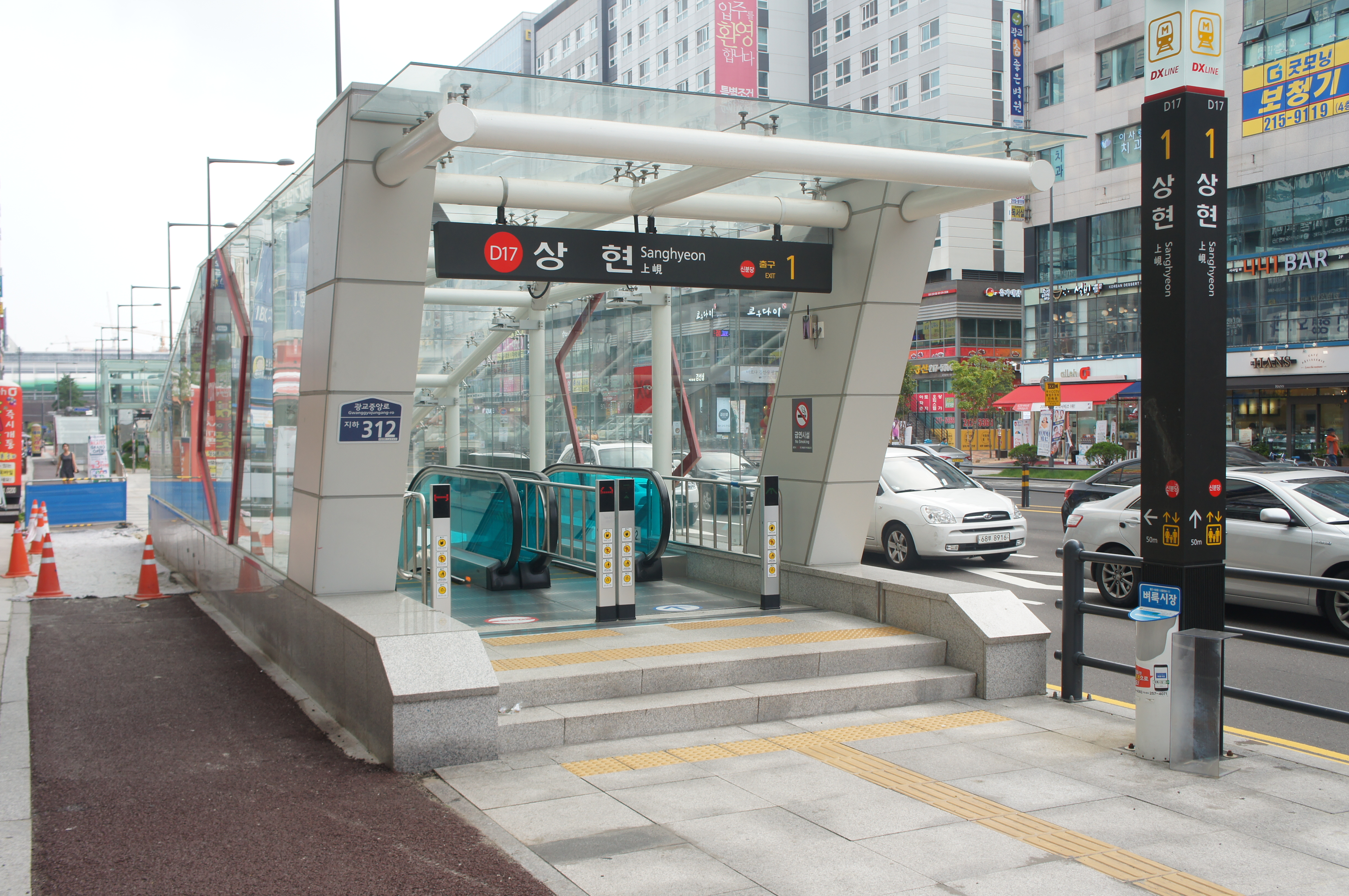 상현역 1번출구